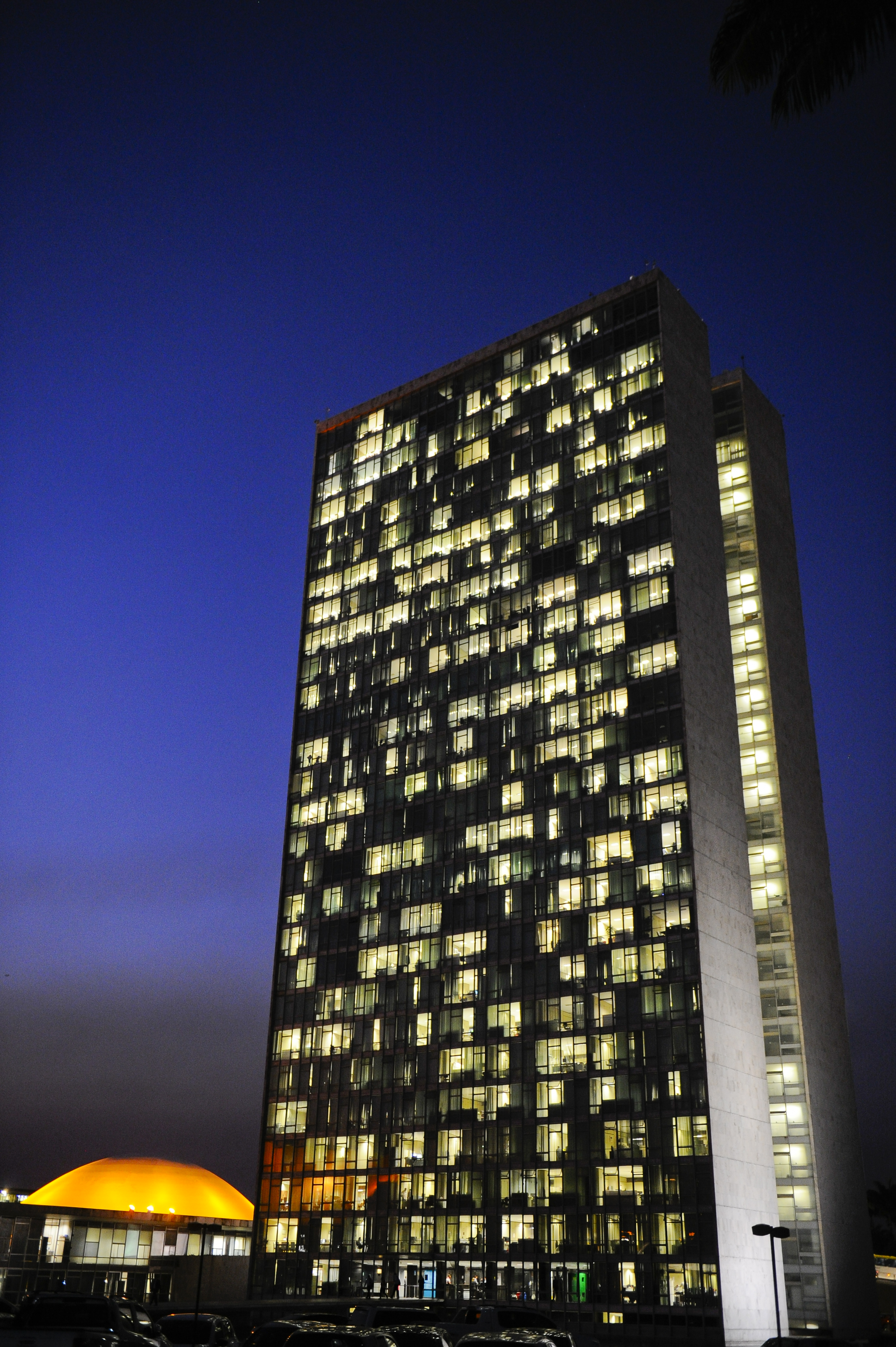 Congresso Nacional. Foto: Marcos Oliveira/Agência Senado